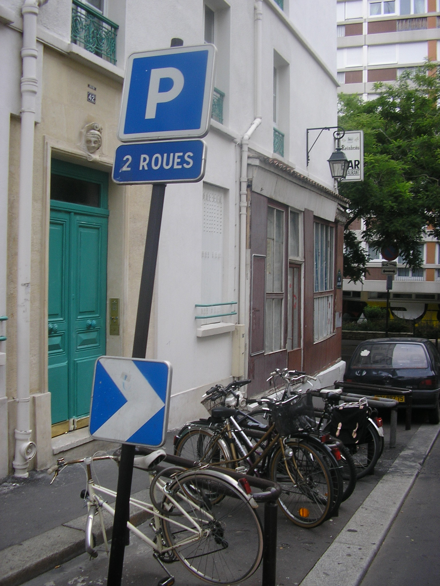 Parking velo Paris.